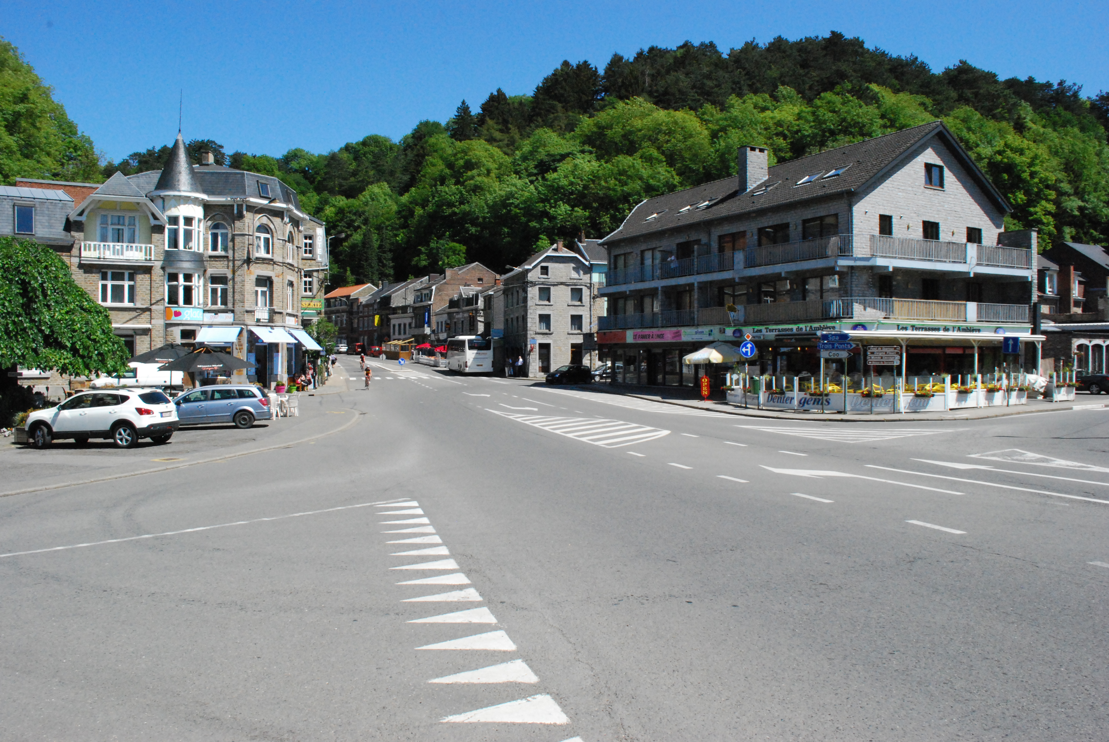 La rue de Louveigné (RN 666), vue du pont sur l'Amblève à Remouchamps.